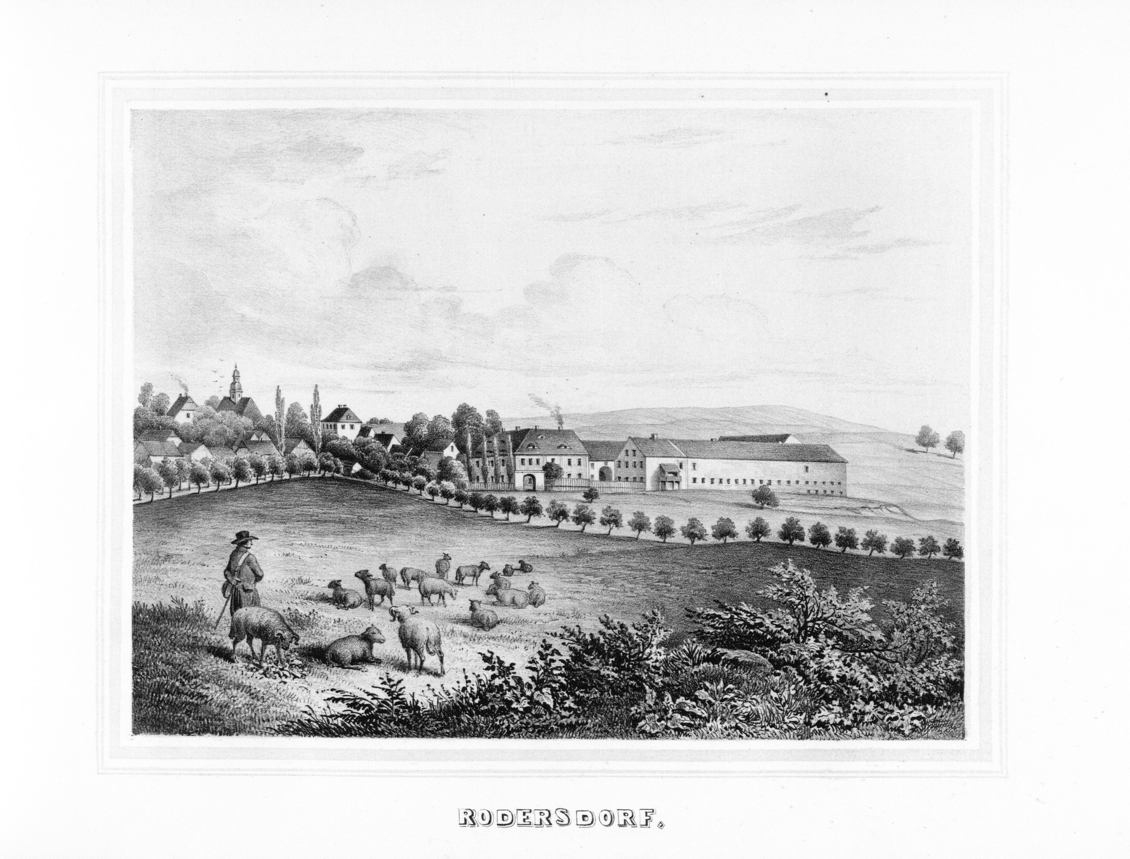 Rodersdorf aus: Album der Rittergüter und Schlösser im Königreiche Sachsen Voigtländischer Kreis Section: V